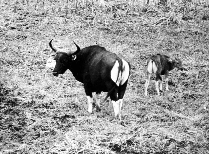 Repronegatief. Een bantengstier en een kalf op een moerasweide in het wildreservaat Udjung Kulon op West-Java